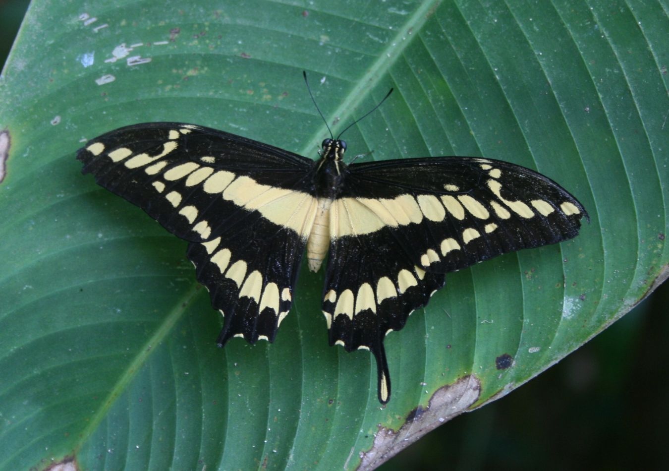 Papilio thoas, Ritterfalter (Papilionidae) - Costa Rica: Prov. Puntarenas, Hacienda Barú NW Dominical, "Butterfly Garden"